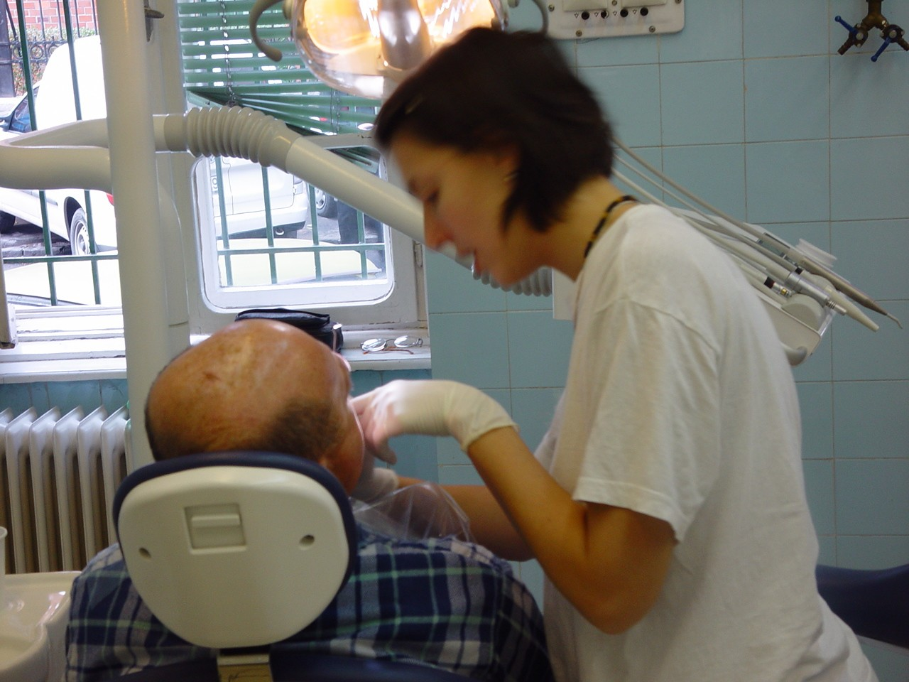 Egy fogorvos és páciense